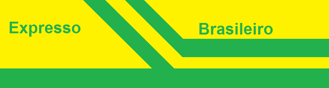 Modelo de logo Expresso Brasileiro